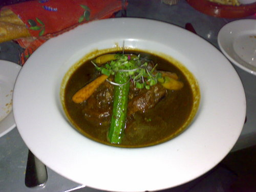 Daube à la provencale